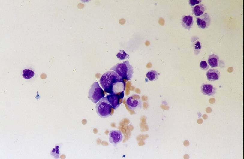 Meningeosis carcinomatosa: Neben Lymphozyten, Monozyten und Erythrozyten finden sich hier im Liquor mehrere atypische Zellen mit basophilem Zytoplasma. Eigenes Bild